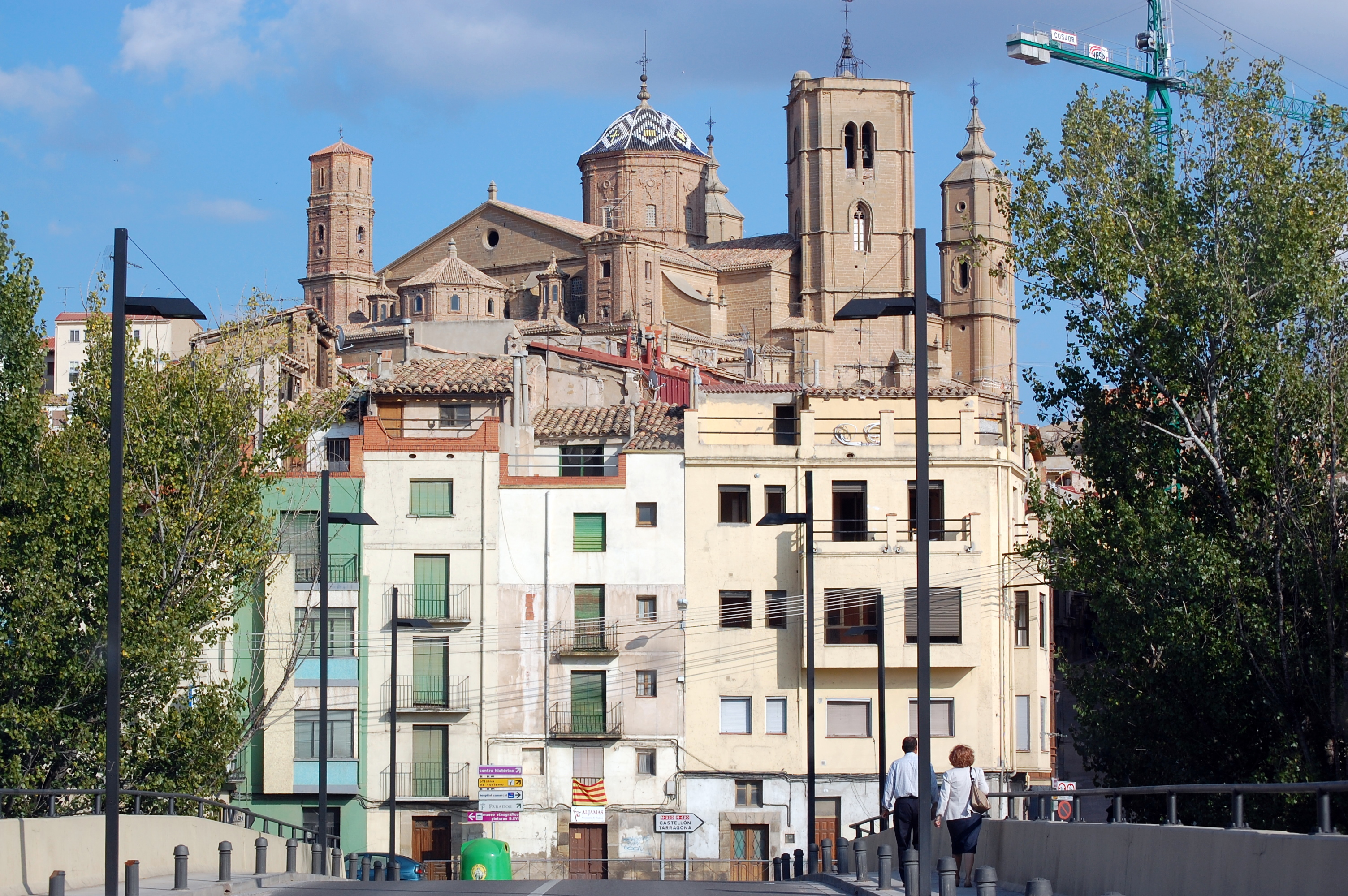 Puente